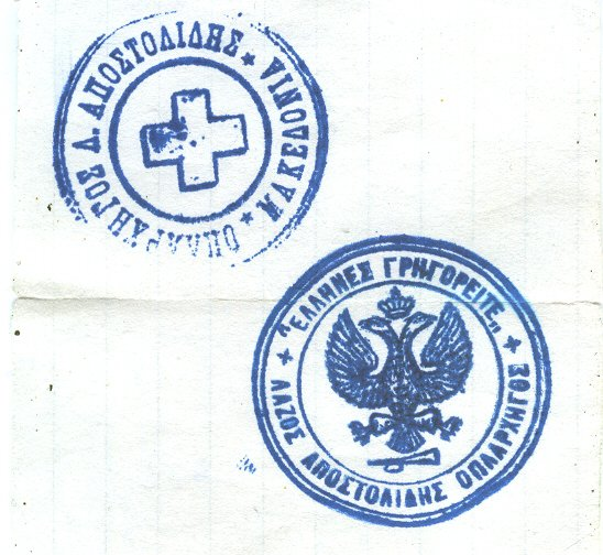 Печат на андартския капитан Лазос Апостолидис.